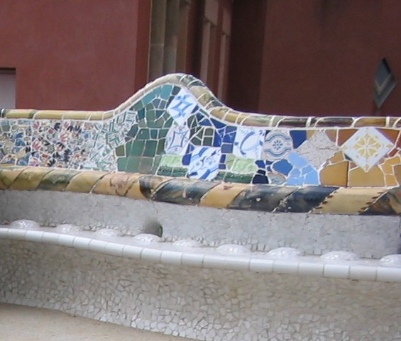 Slika klupe ukrašene trenkadisom u Parku Güell u Barseloni.